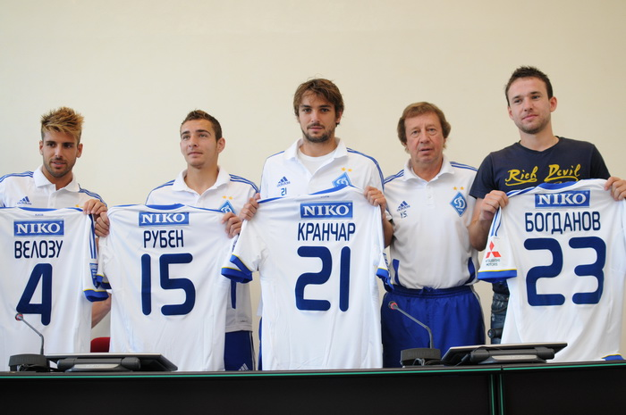 Презентація новачків Динамо: Презентація новачків Динамо перед початком сезону 2012-2013